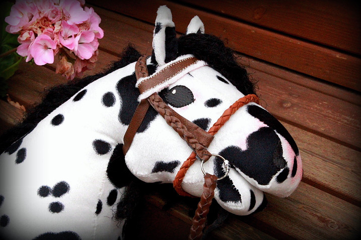 Käsintehty keppihevonen suitsineen.